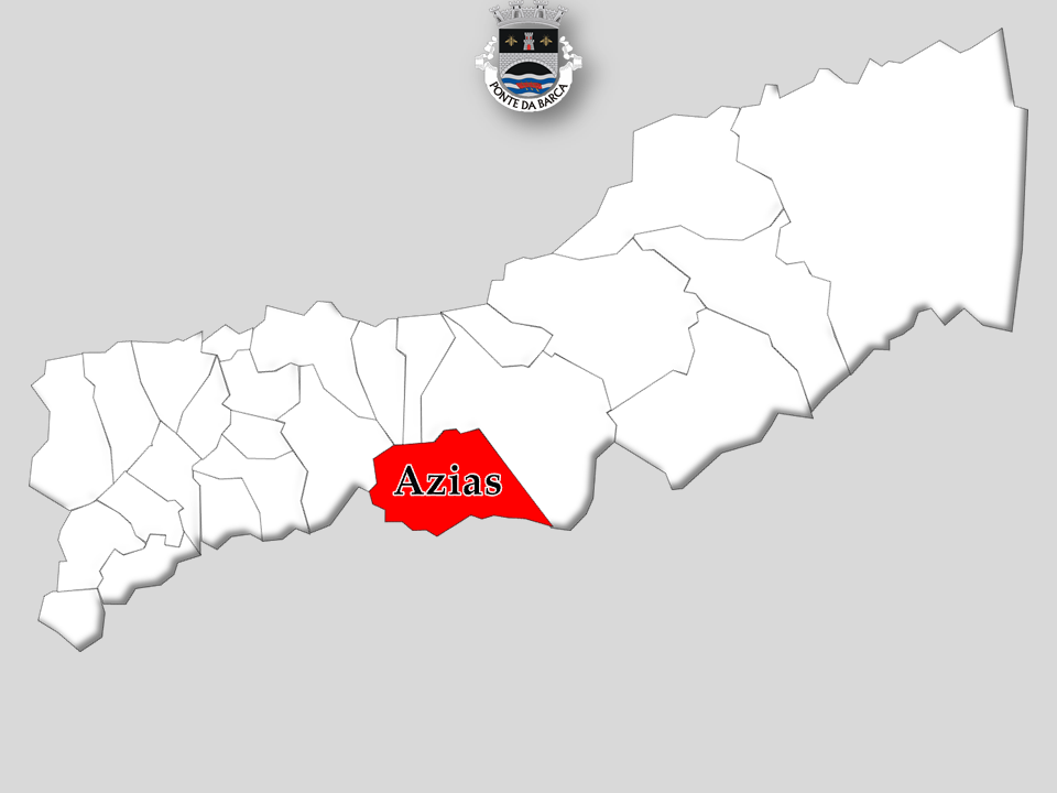 Censos 1864/2011